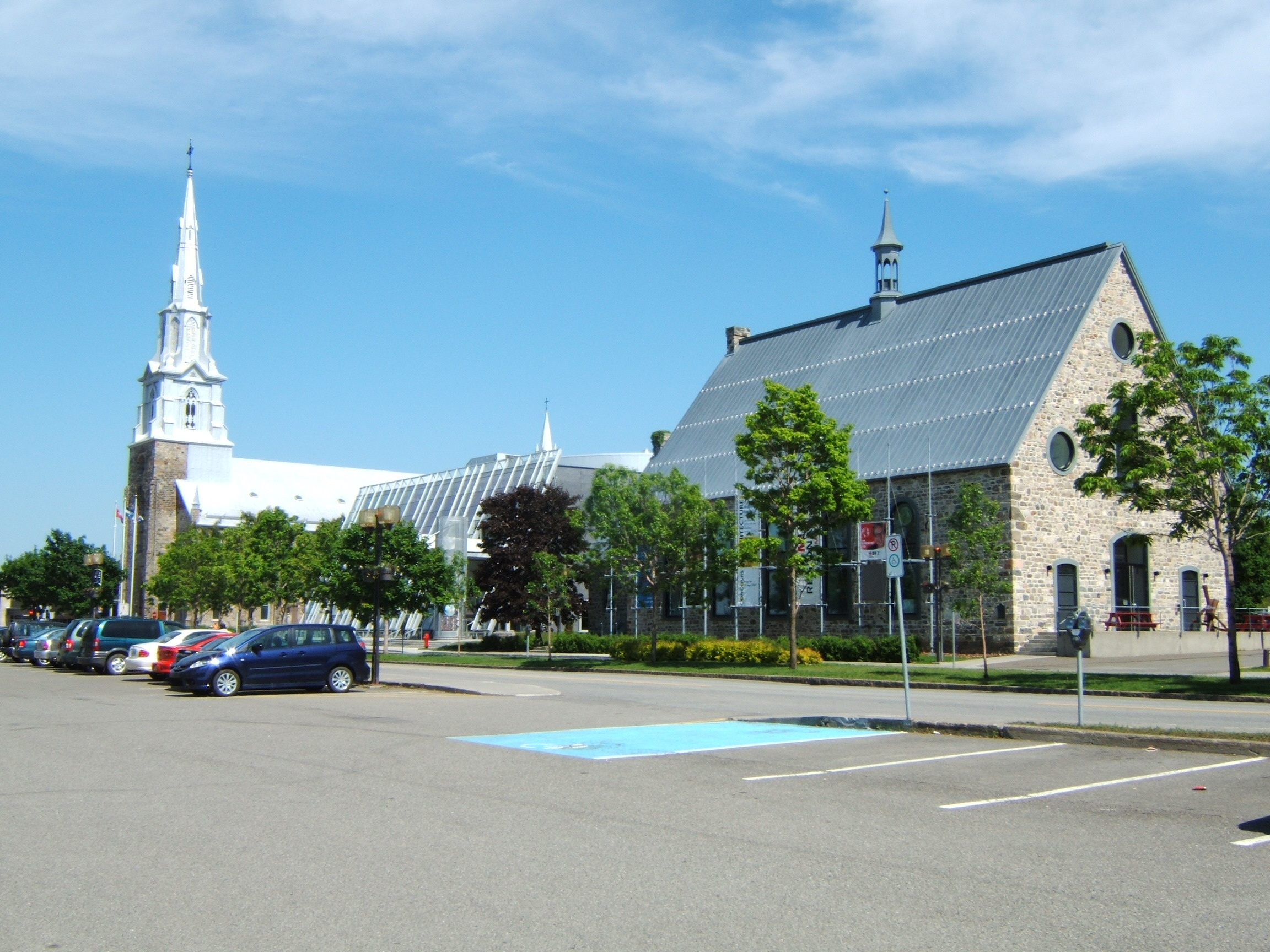 Centre-ville de Rimouski avec dans l'ordre, la Cathédrale Saint-Germain, la salle de spectacle Desjardins-Telus et le Musée régional de Rimouski.